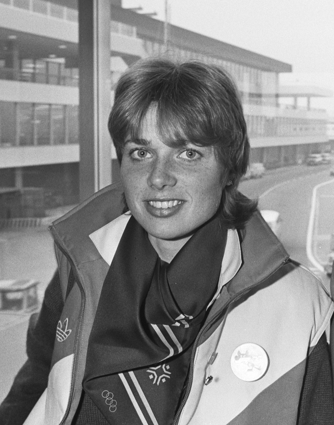 Ria Visser